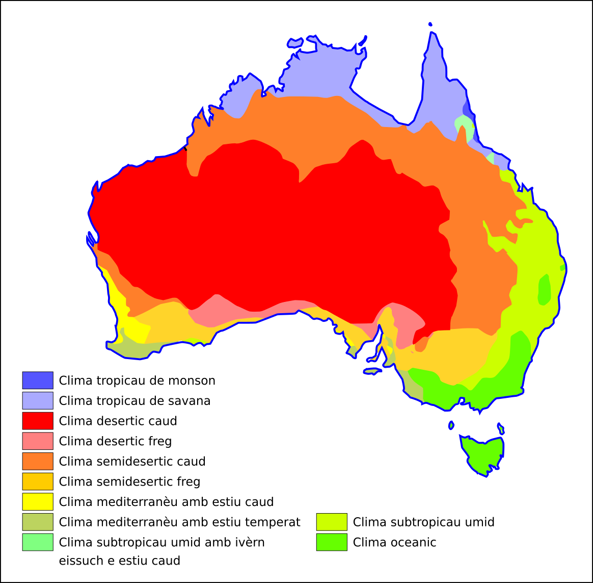 Carta simplificada dau clima australian